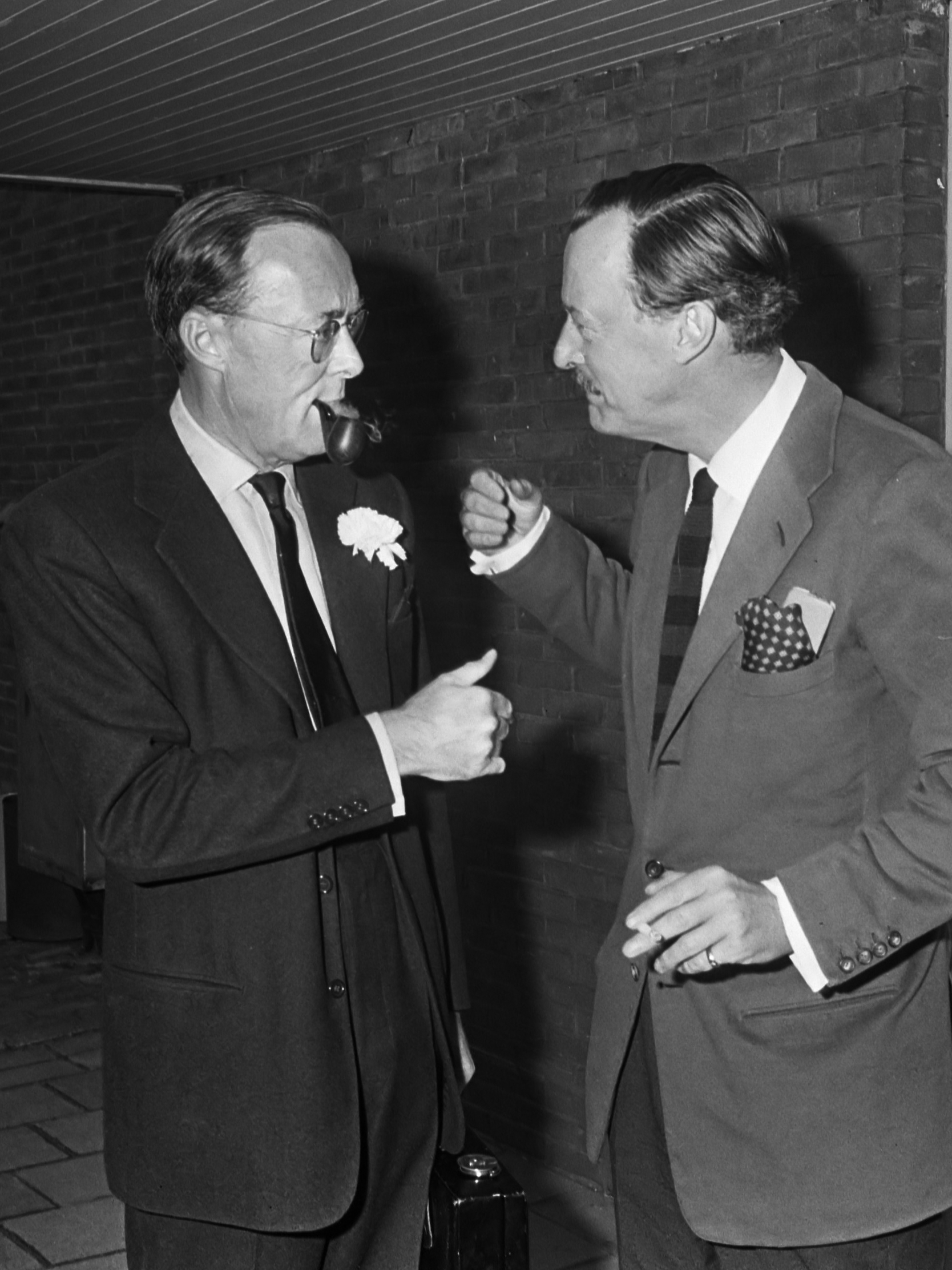 Prins Aschwin en prinses Simone van Schiphol vertrokken naar New-York, prins Bernhard neemt op Schiphol afscheid van zijn broer prins Aschwin 4 april 1966